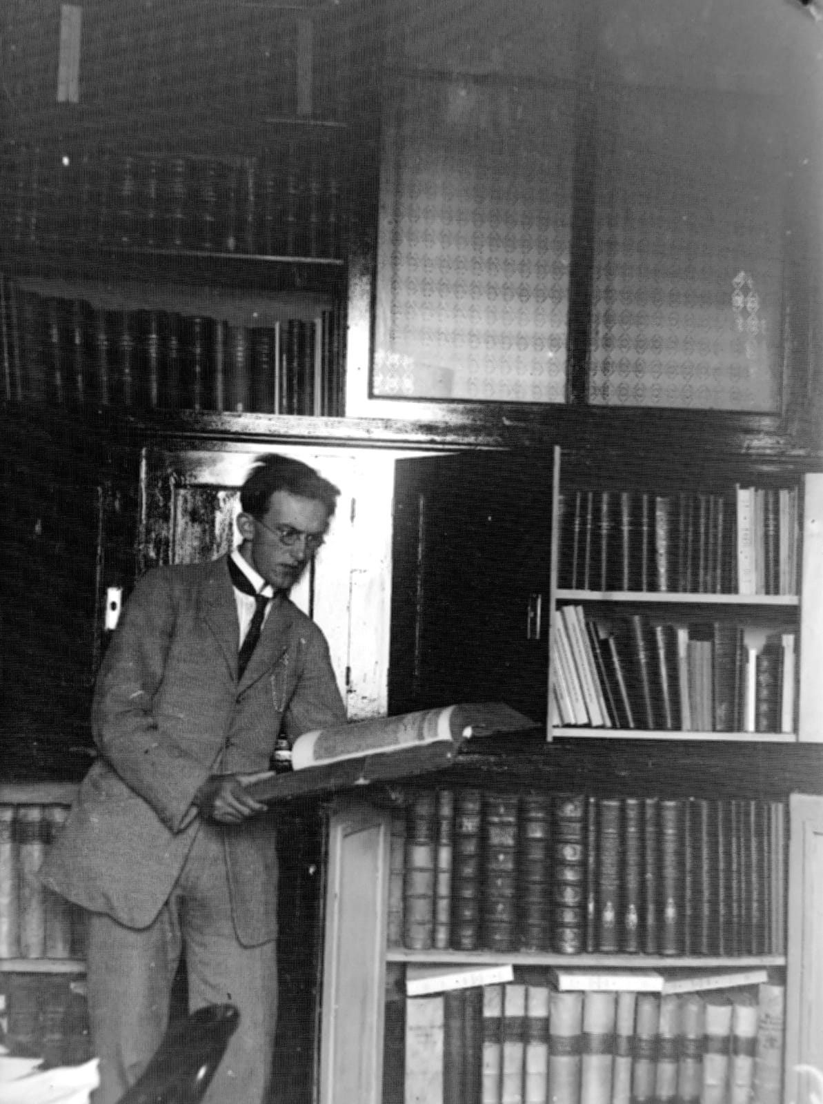 Carlo Tagliavini fotografato da giovane nella biblioteca di famiglia a Bologna